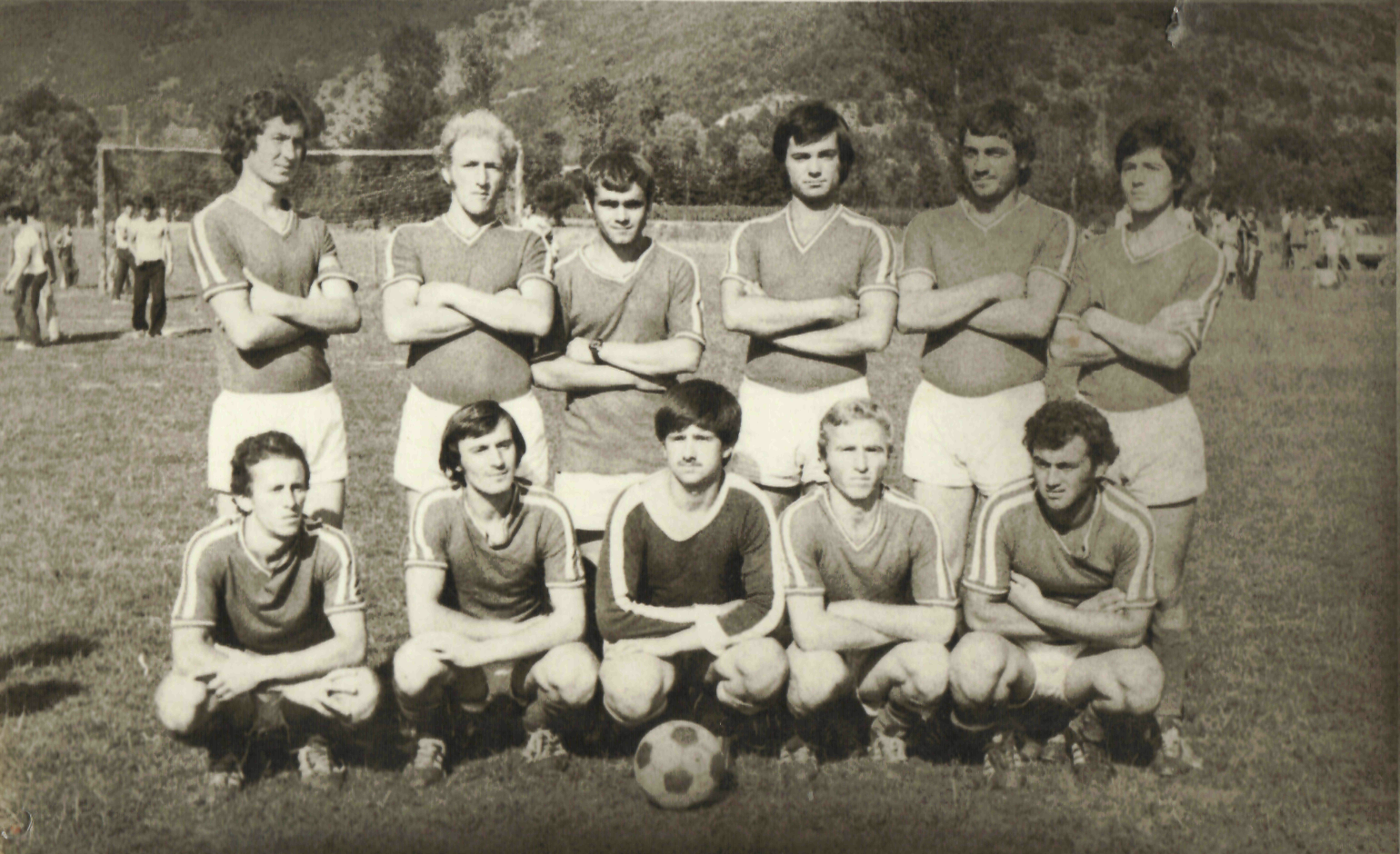 Членовите на ФК Радиовце во 1978 година во времето кога се општински шампиони.